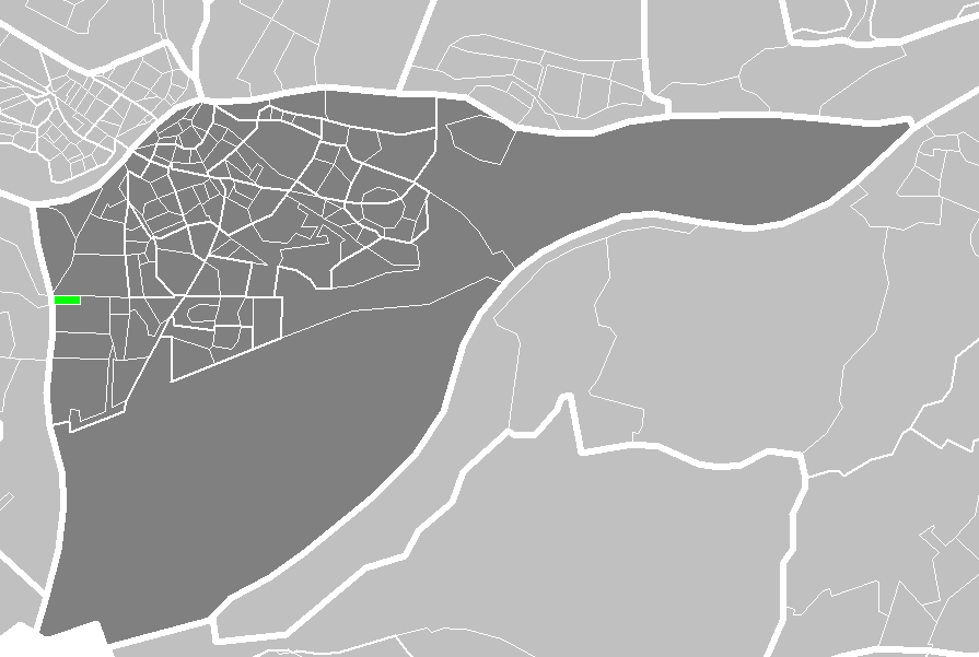 Districts in Dordrecht